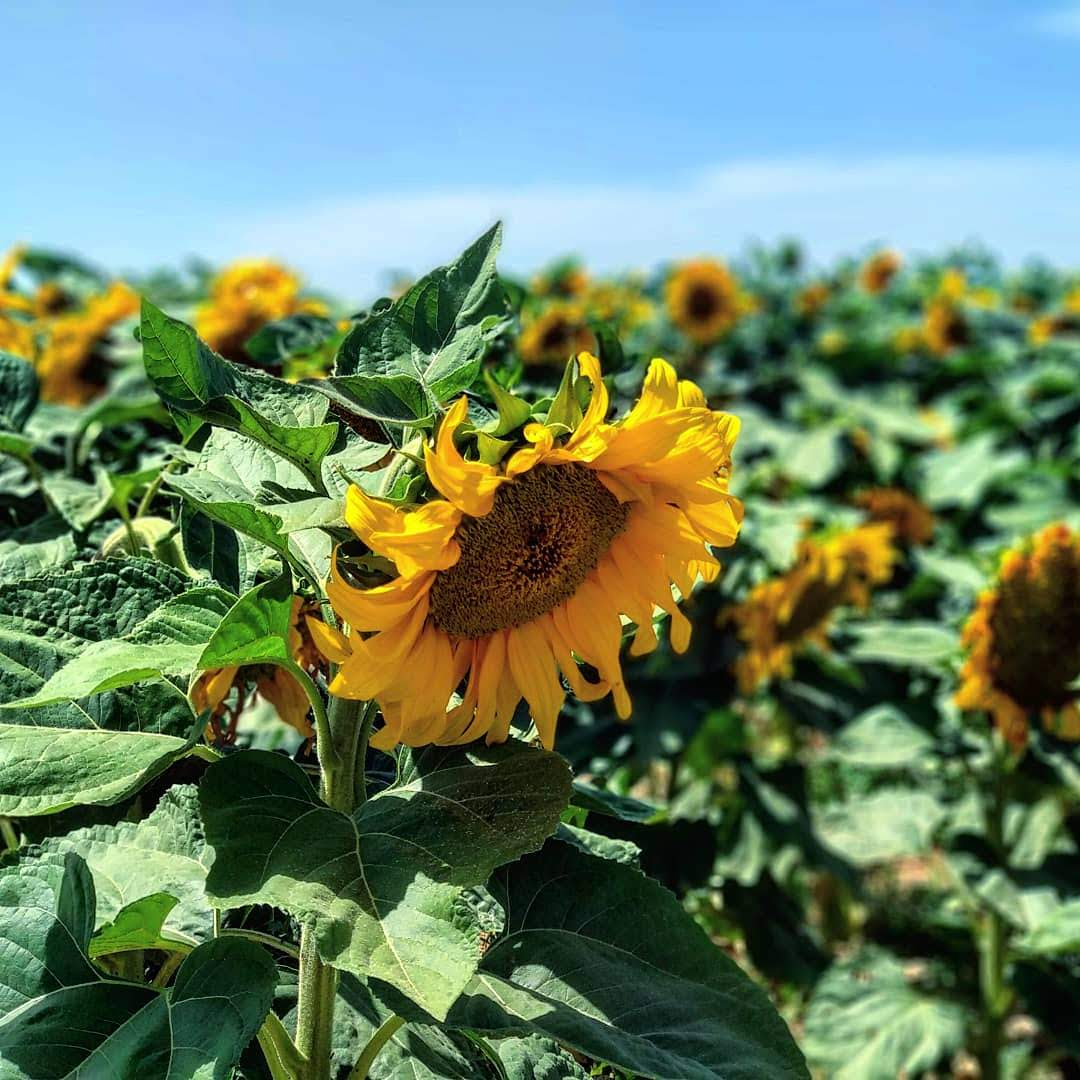 שדה חמניות בקיבוץ עין השלושה. צולם בחודש אייר השתע"ט